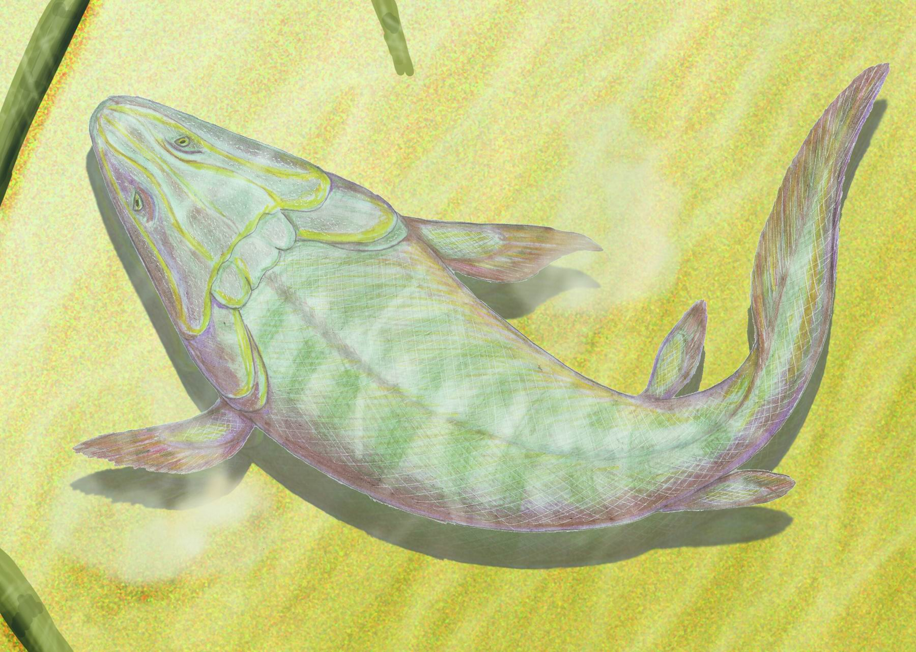 Panderichthys